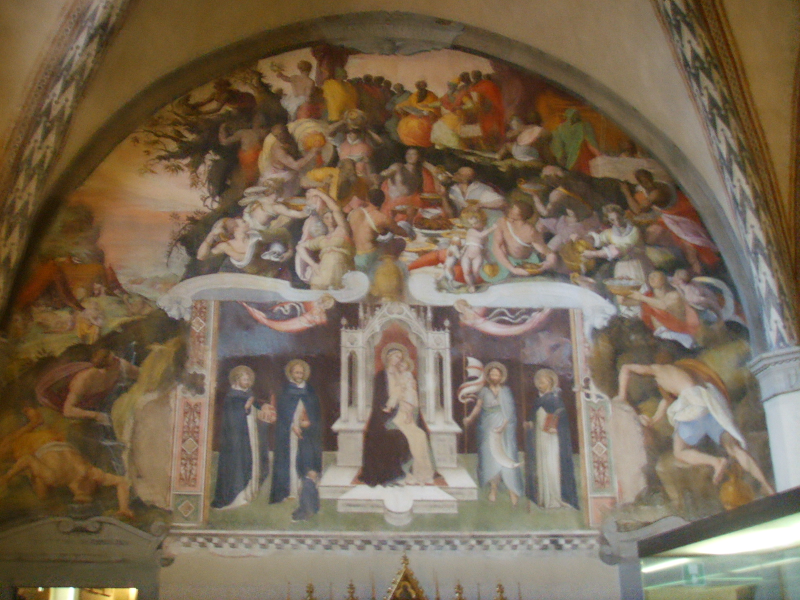 Santa Maria Novella church, Refettorio, fresco by Andrea Bonaiuto and Alessandro allori, in Florence, Italy